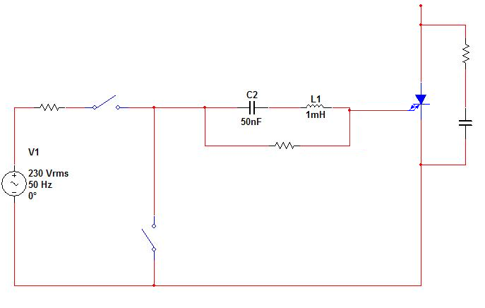 Zelf gemaakt